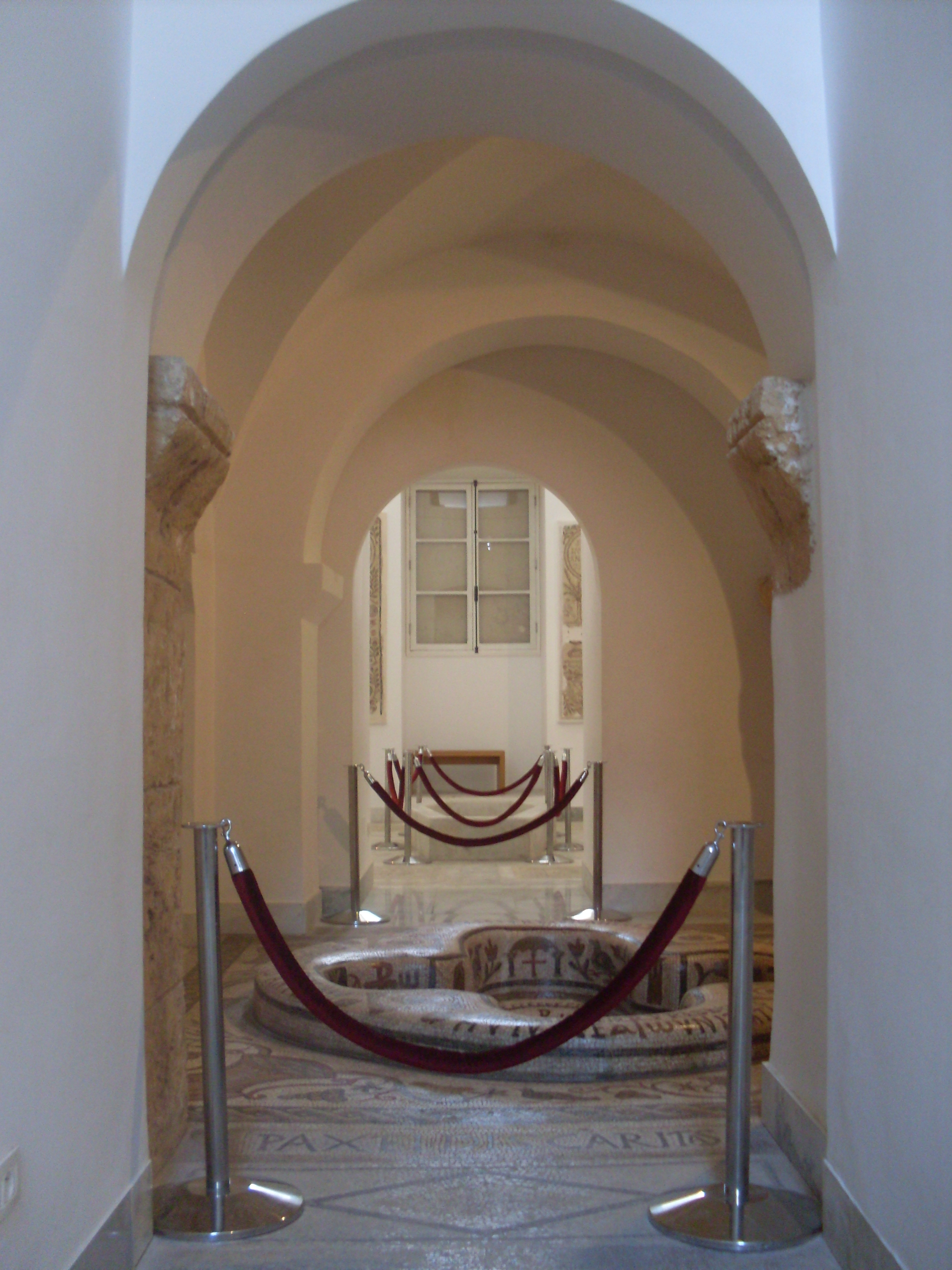 Tunis, Nouvelle extension du musée national de Bardo, Baptistère de Kelibia